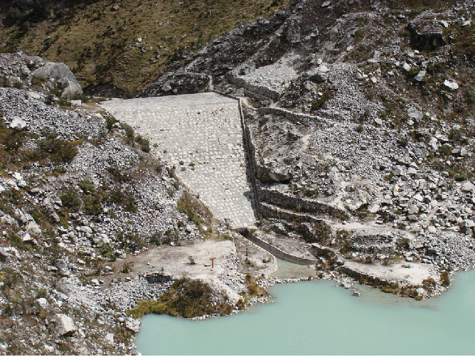 Dique en la laguna de Llaca, quebrada de Llaca, Cordillera Blanca en Perú.